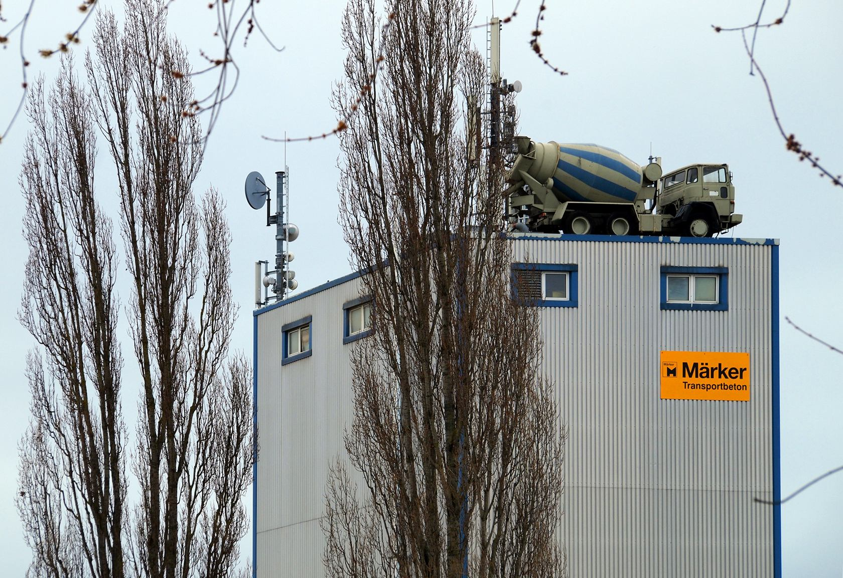 Ein Betonmischer auf dem Gebäude des Frischbetonwerks von Manzbeton in Filderstadt-Bernhausen. 2012–2017 Märker-Transportbeton, jetzt Werk 23 von Godel-Beton